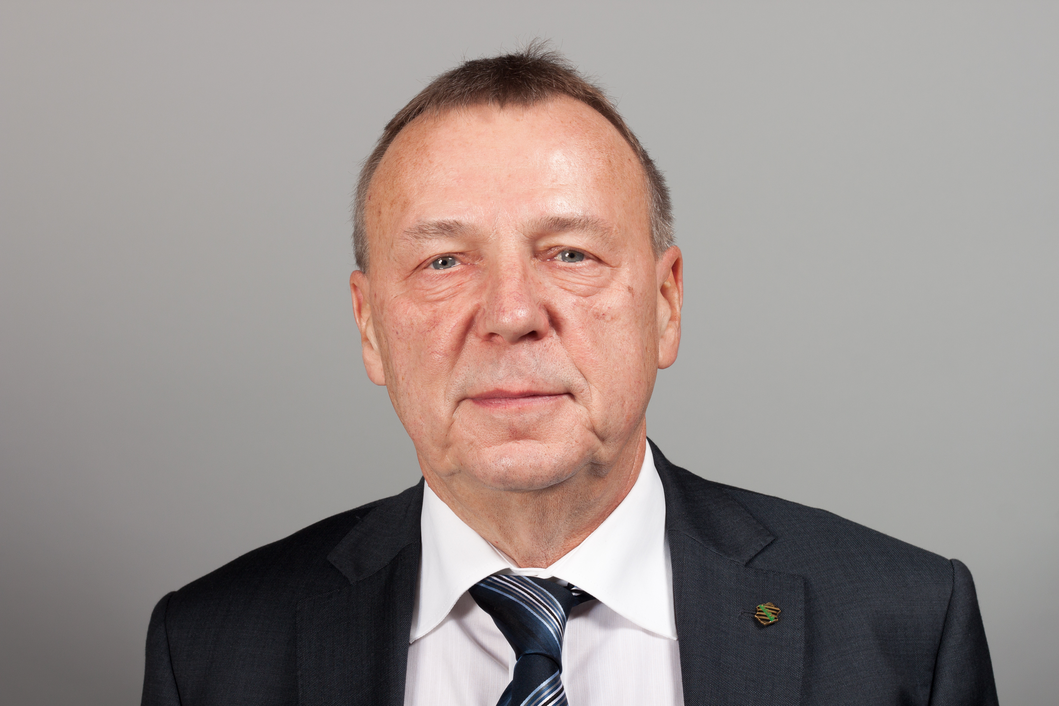 Abgeordneter des Sächsischen Landtages Alfons Kienzle